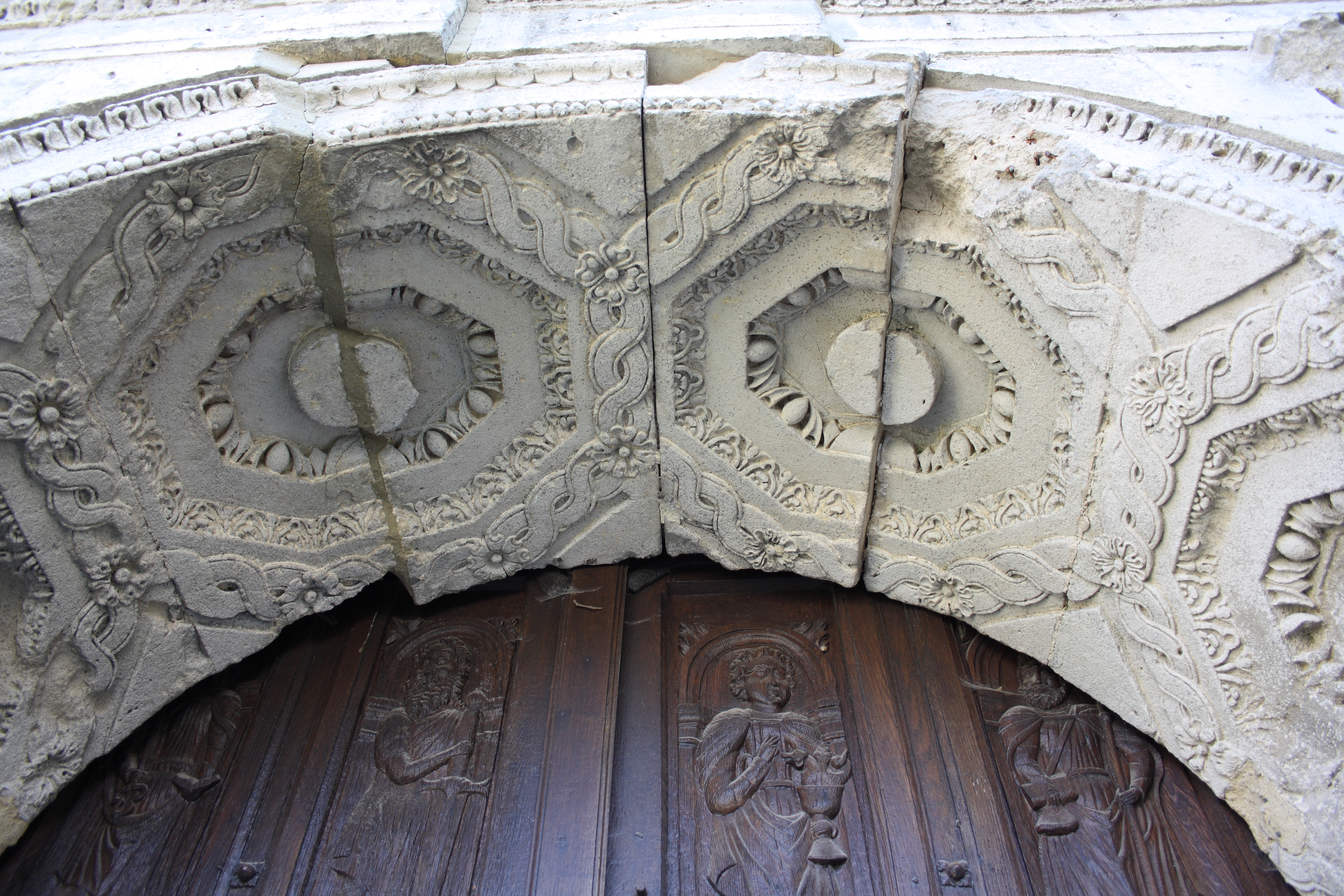 Kirche Saint-Pierre in Genainville